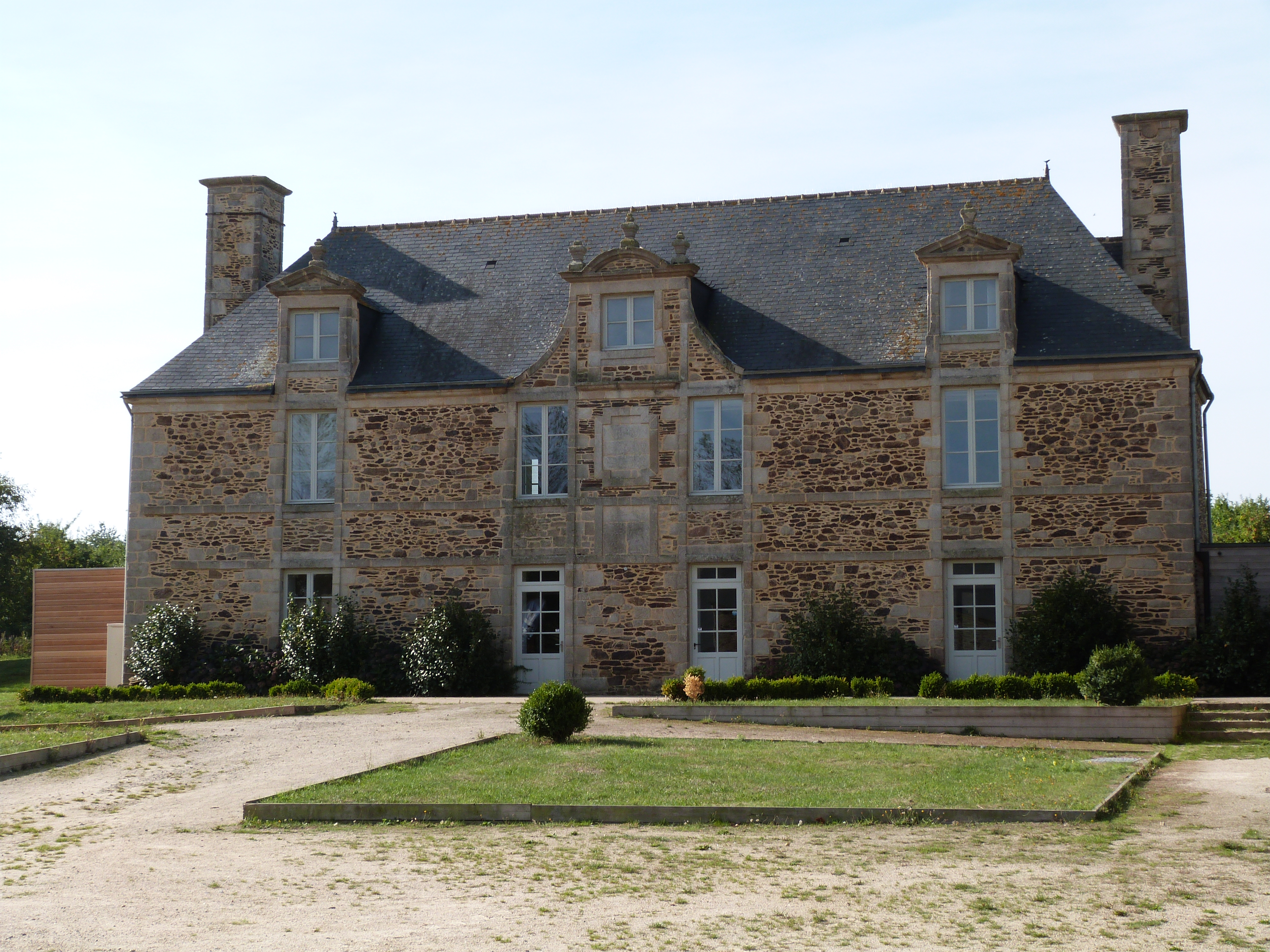 Manoir du Lou